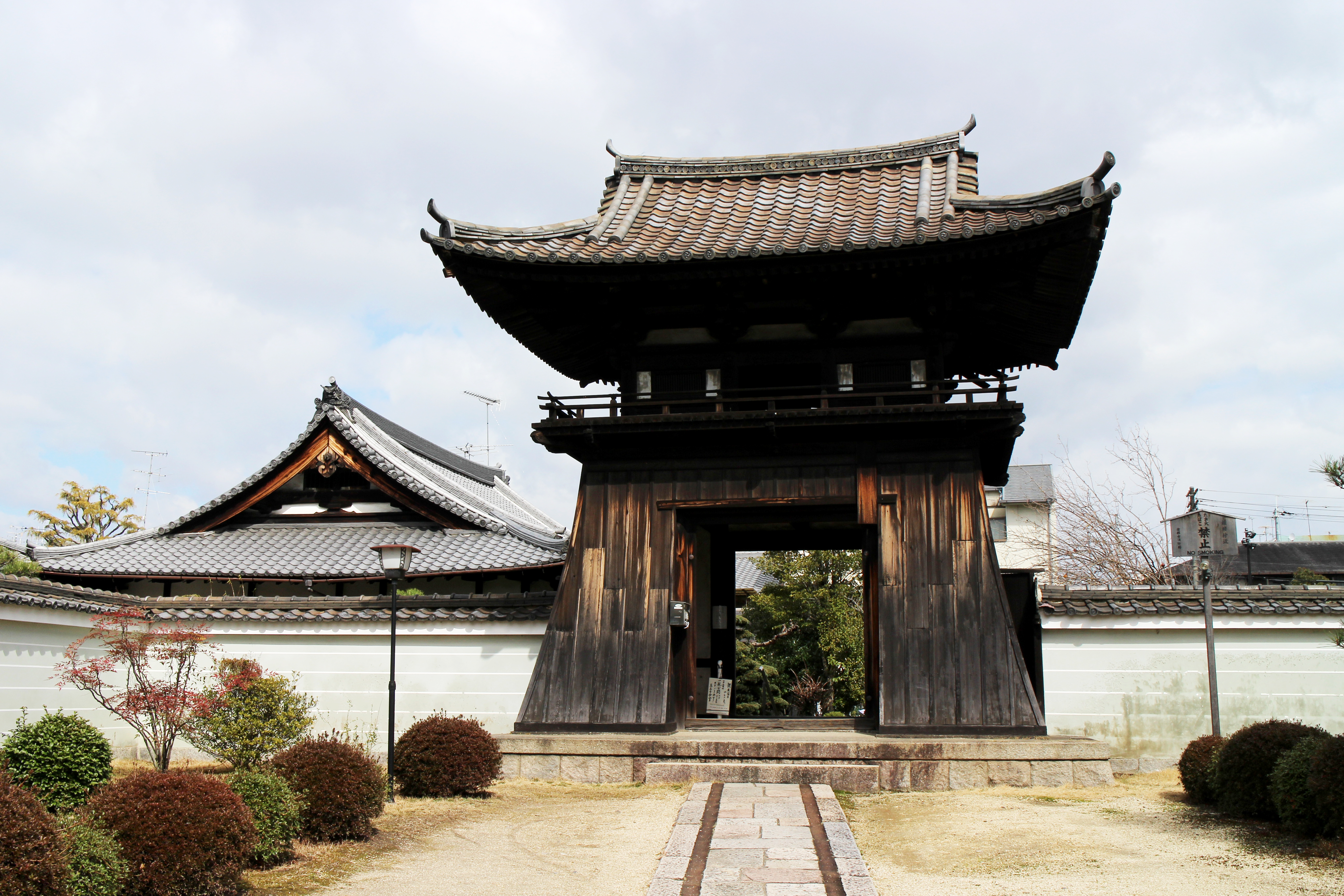 京都万寿寺の鐘楼